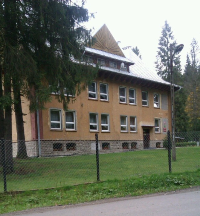 Soblówka, Szkolne Schronisko Młodzieżowe. Budynek po byłej Strażnicy Wojsk Ochrony Pogranicza Soblówka (WOP), od 16 maja 1991 roku Strażnica Straży Granicznej w Soblówce do 2005 roku.